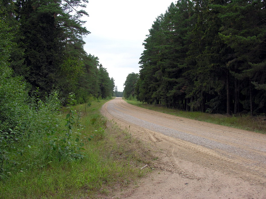 Vieškelis per Jonaičių mišką, Mažeikių raj., Tirkšlių sen. Foto: Algirdas, 2006 m. rugpjūčio 2 d., lietuva